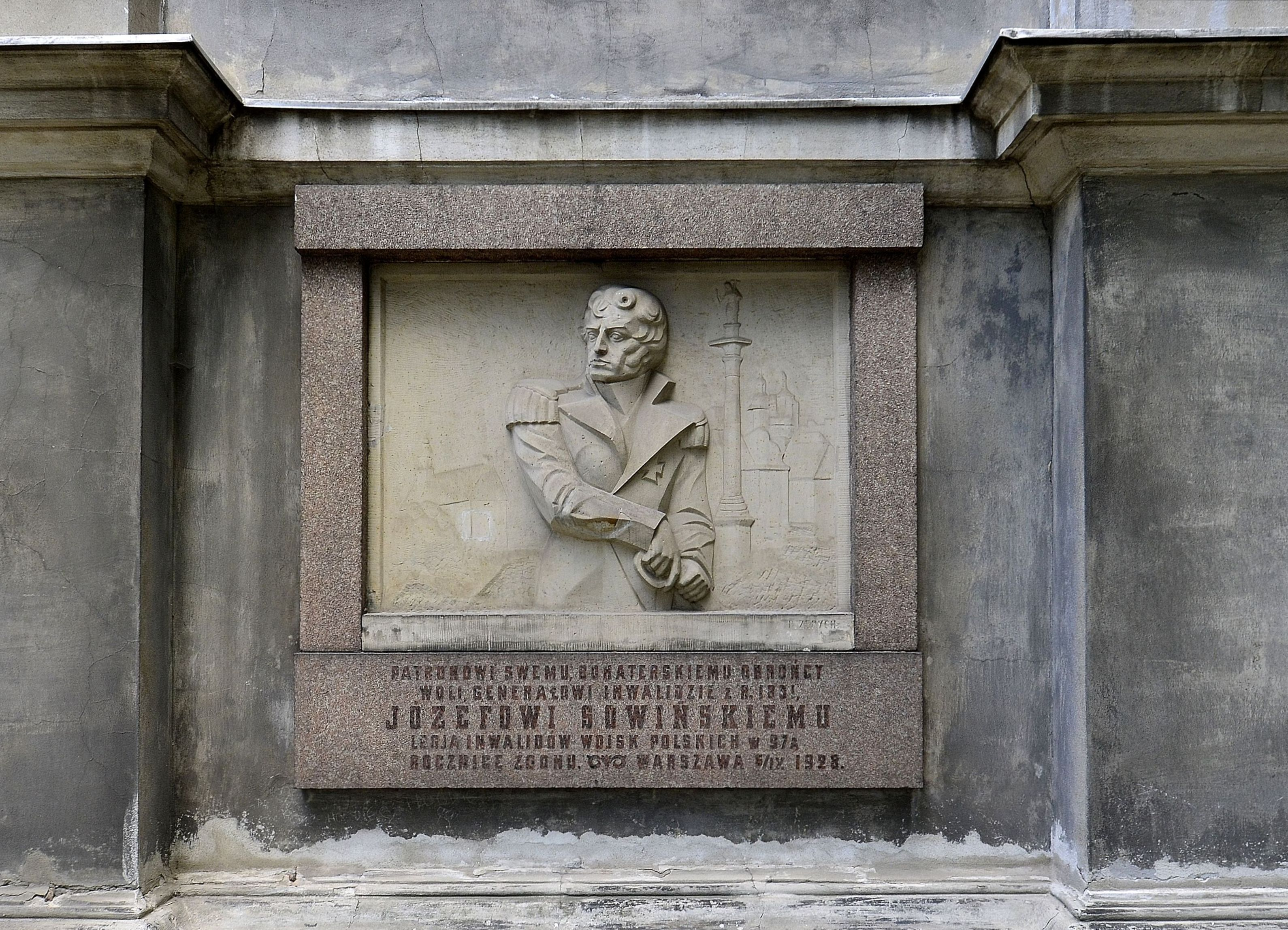 Tablica upamiętniająca gen. Józefa Sowińskiego Lwowskich" na bocznej ścianie kościoła św. Wawrzyńca w Warszawie